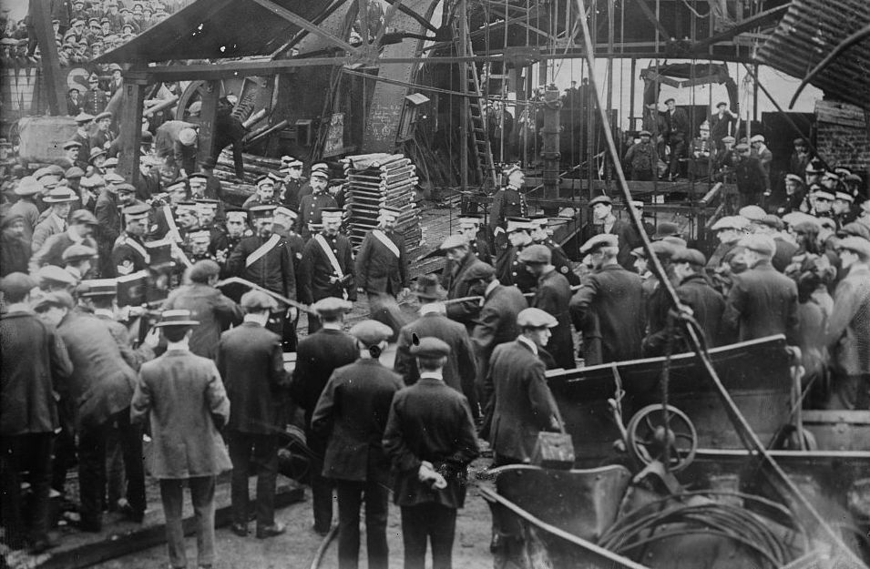 Senghenydd Colliery Disaster, Senghenydd, Wales.